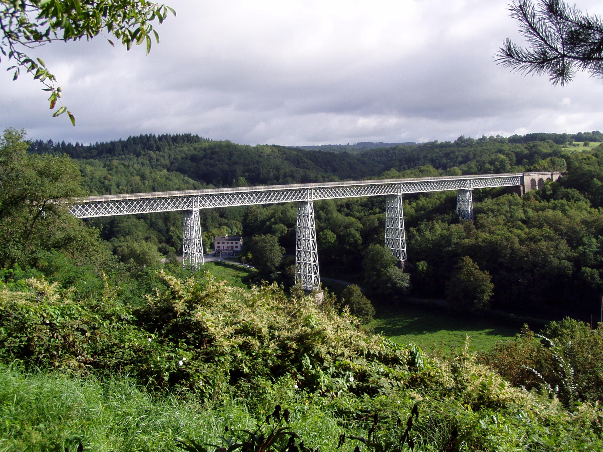 Catégorie:Viaduc du Massif Central Viaduc de Busseau sur la commune d'Ahun, Creuse, France photo personnelle de Françoise Thurion alias Accrochoc prise en septembre fr:2004 avec un appareil photo numérique Olympus Camedia C725